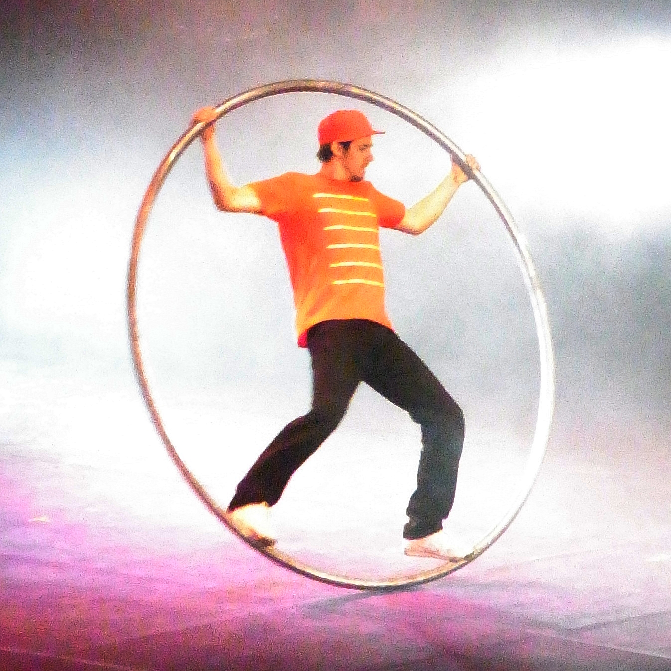 ExtraSchicht 2011, Nordsternpark: Urbanatix in der Arena